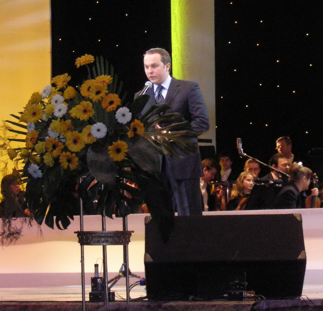 Нестор Шуфрич выступает на вручении ежегодной премии "Золотое Перо", г. Киев